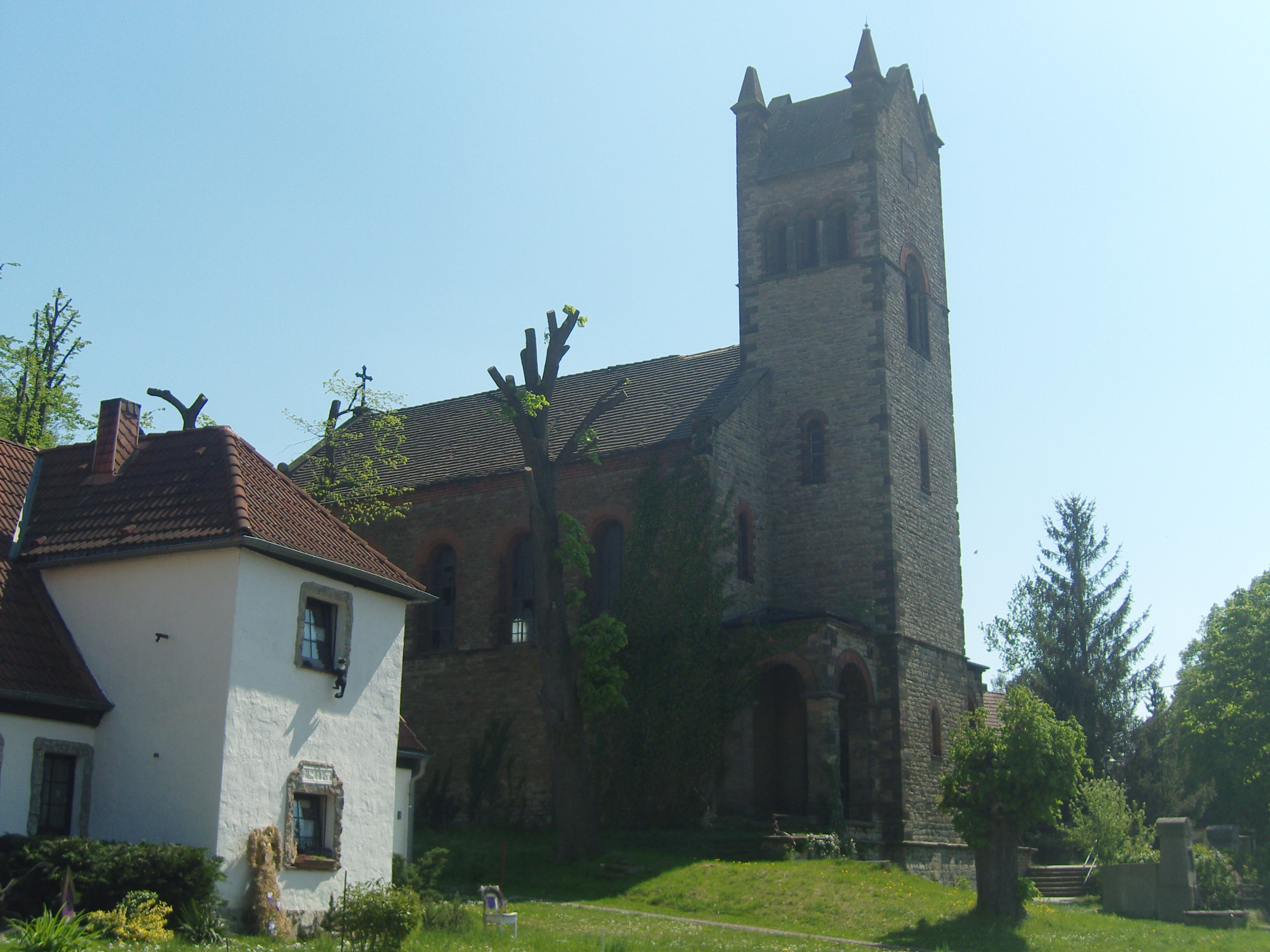 Kirche in Kleinkorbetha